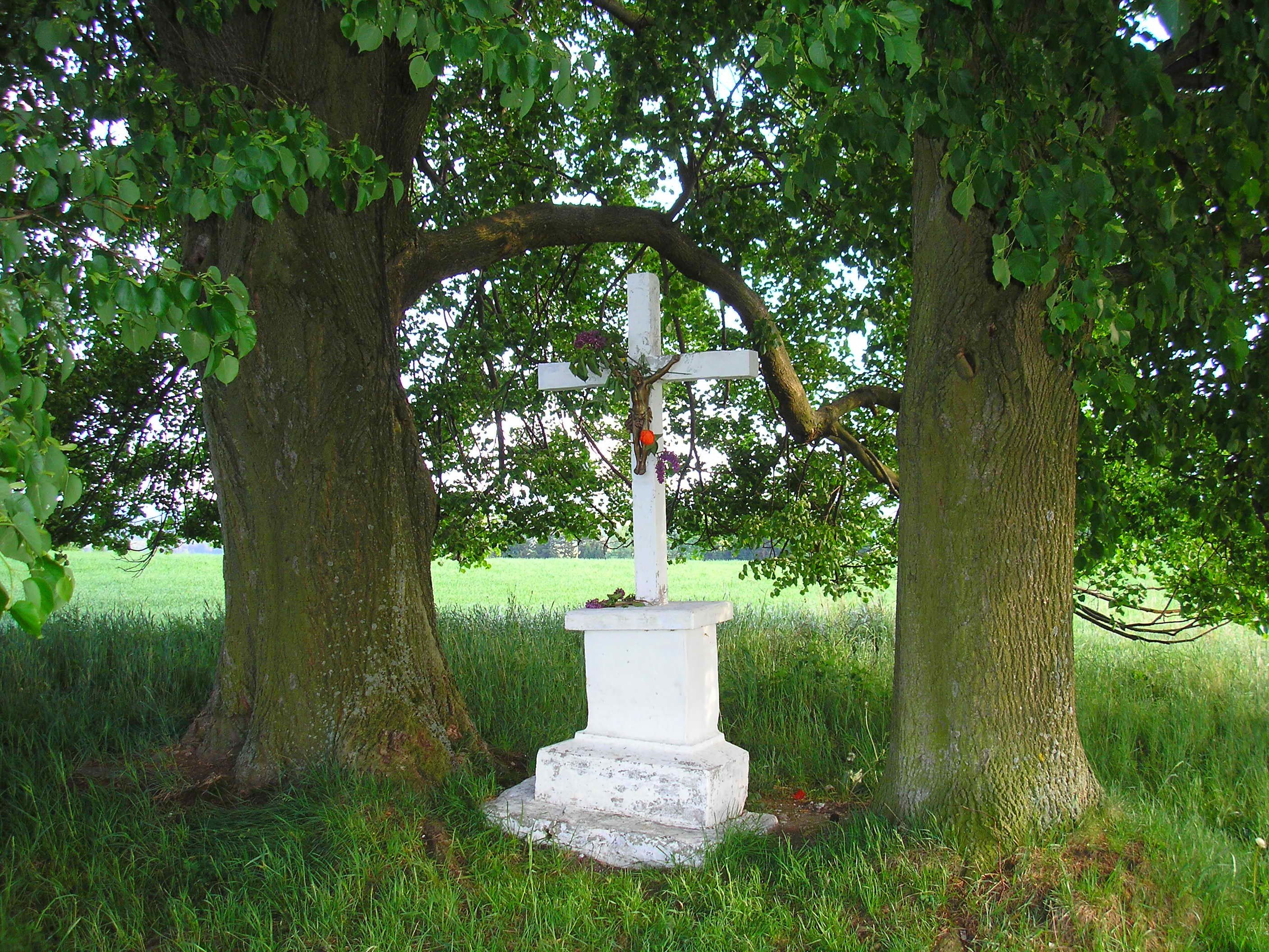 Křížek mezi dvěma stromy u silnice poblíž Střížova v okrese České Budějovice